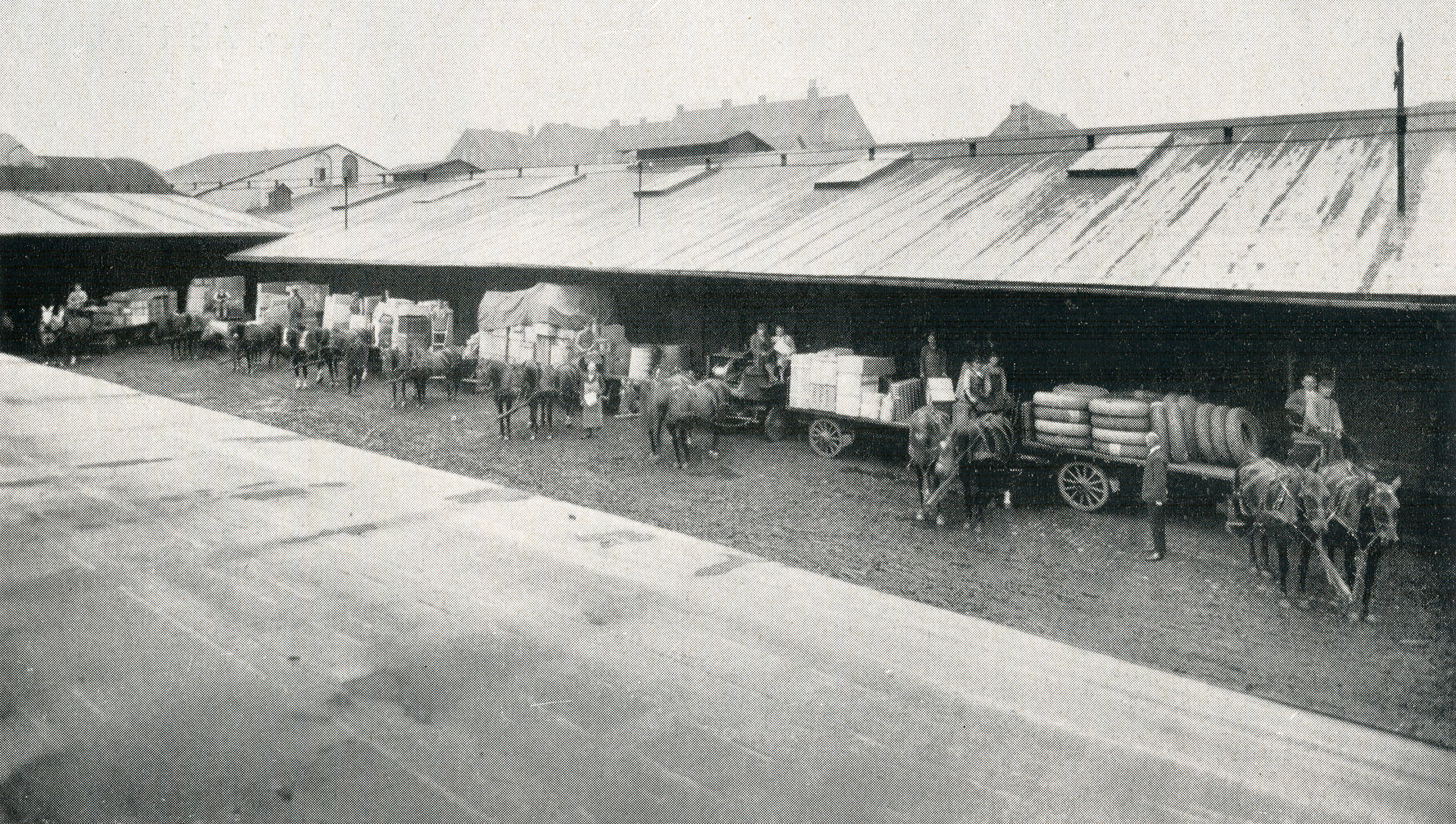 Punktgerasteter Abdruck einer Fotografie um 1900, die die Spedtion Bäte in Hannover, hier noch in der Bachstraße 3 in der Nordstadt zeigt. Zu sehen sind zumeist offene, beladene Pferdefuhrwerke mit Waren, teilweise mit Planen , in der Regel als Zweispänner, und ihre Kutscher auf einem der Höfe des Unternehmens ...